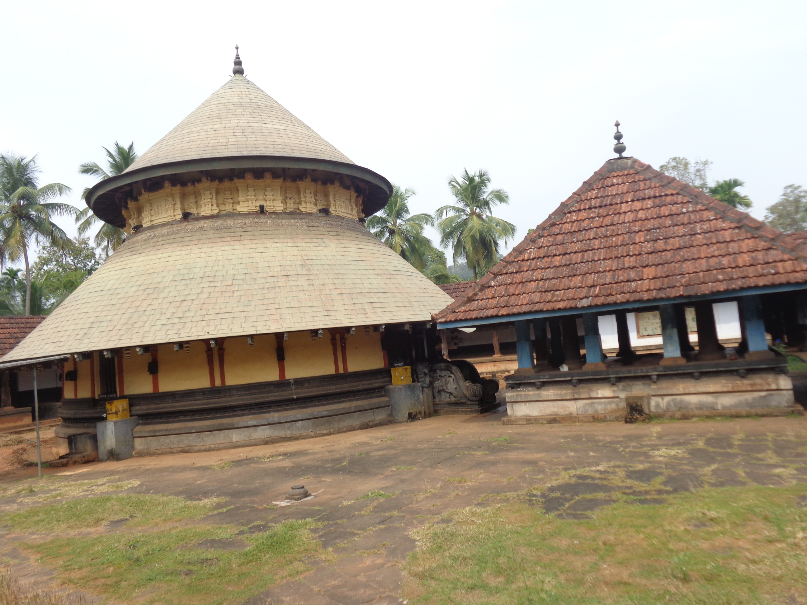 Karikkkad subrahmanya temple- the sreekovil of vadakkumthevar